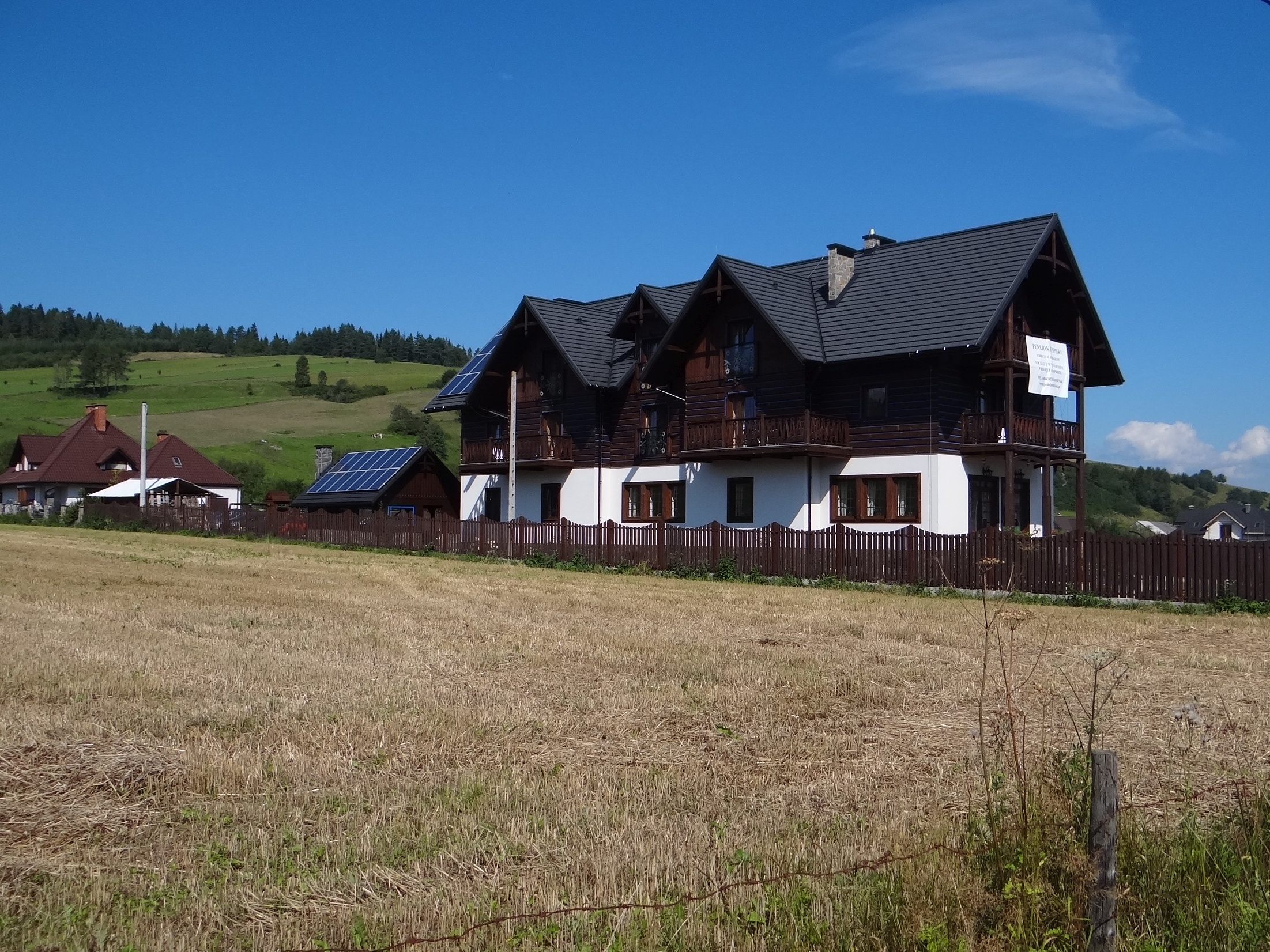 Kacwin